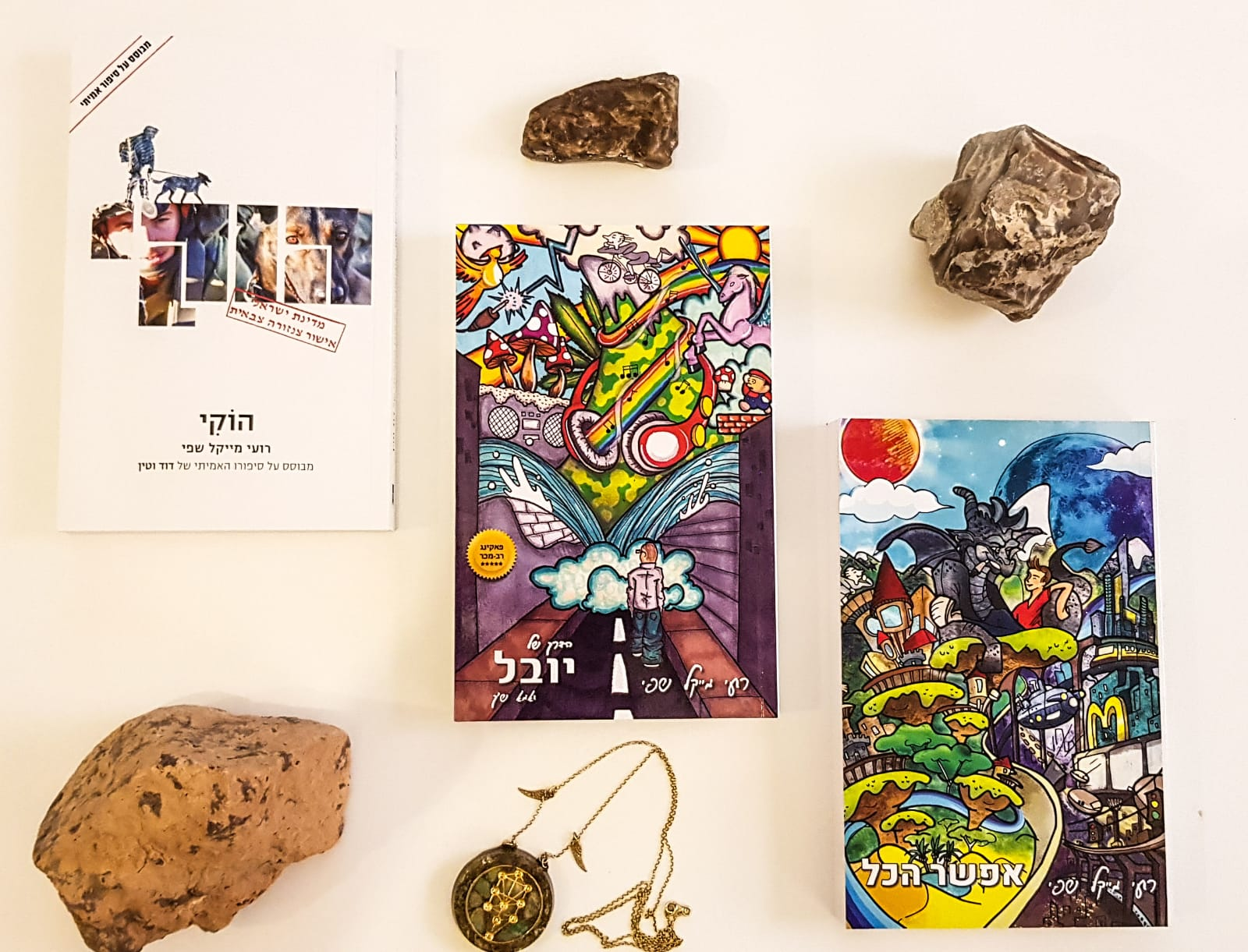 רועי מייקל שפי - ספרים